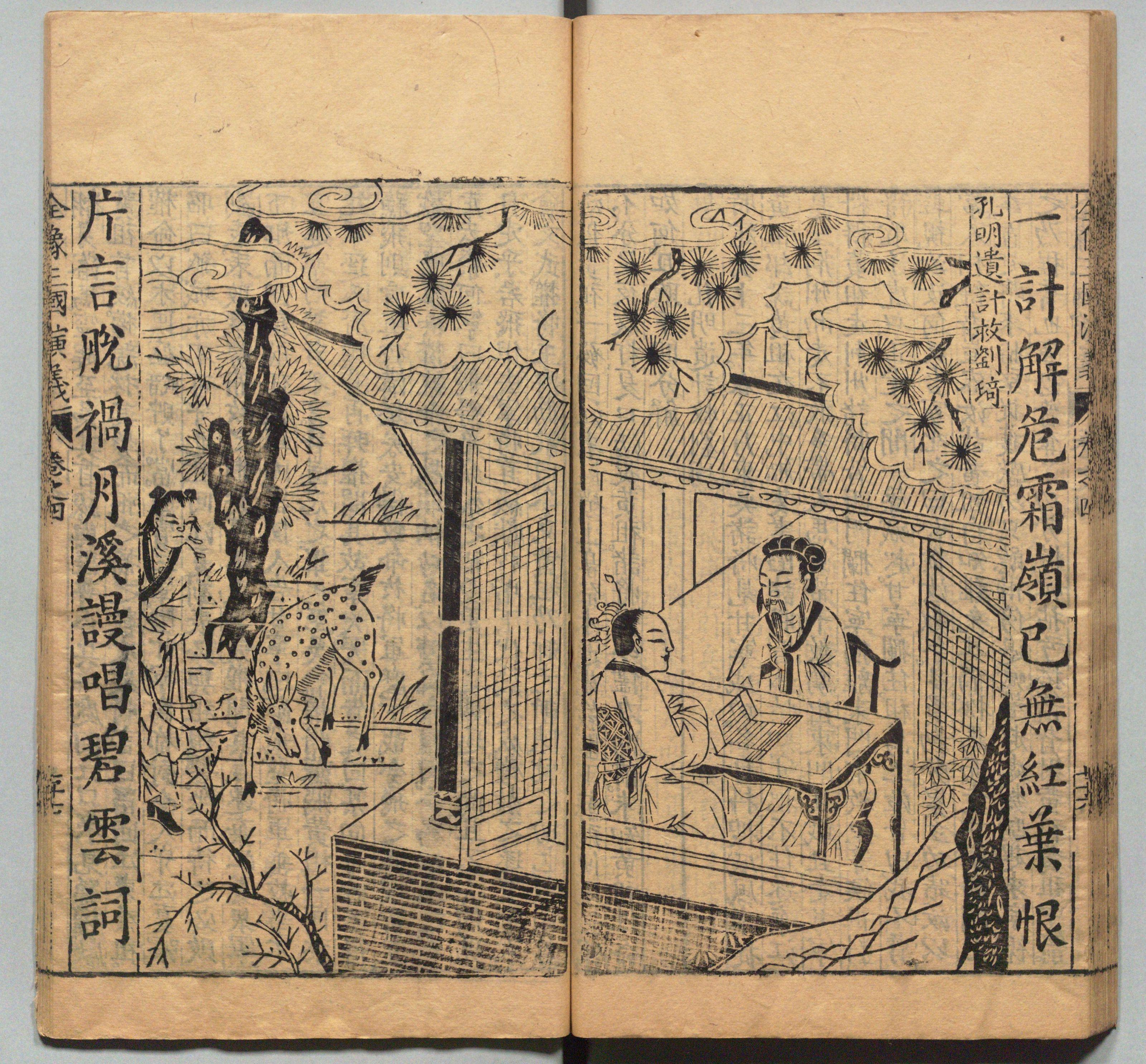 新刊校正古本大字音释三国志通俗演义 明万历十九年书林周曰校刊本